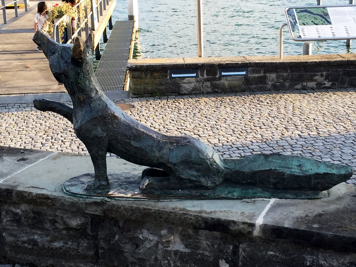 Hans Jakob Meyer, Kunst im öffentlichen Raum